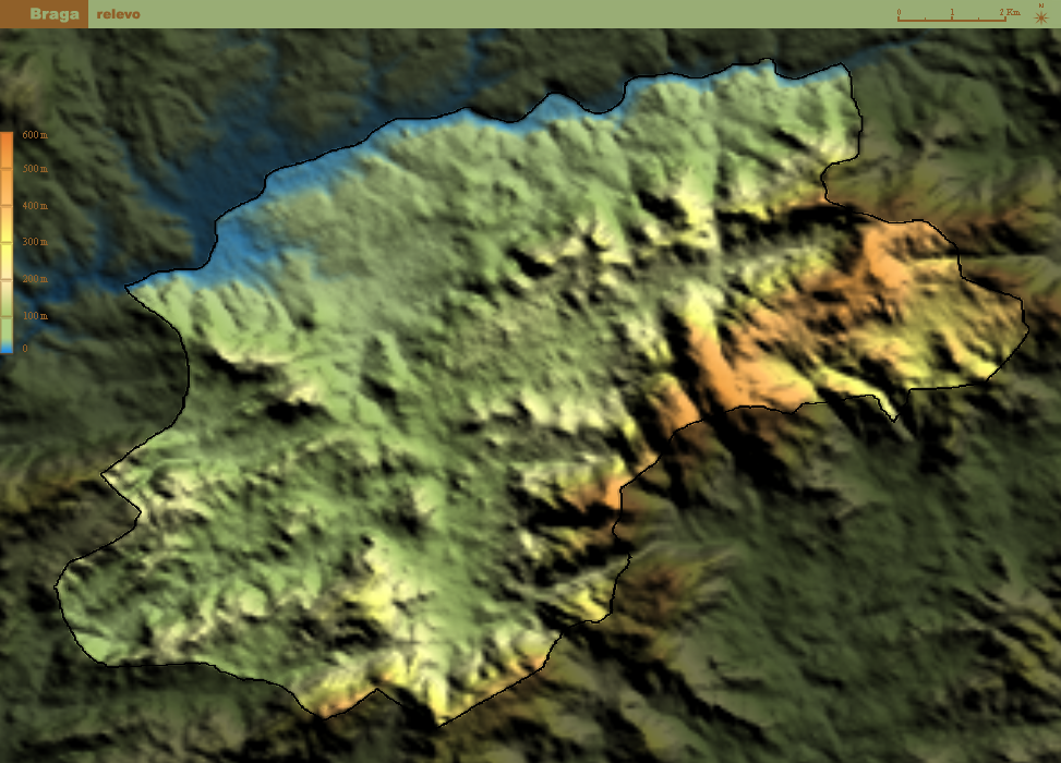 Relevo do concelho de Braga. Nota: devido à imprecisão dos dados, o limite do concelho é uma aproximação com um erro de 0 a 100m (estimativa).